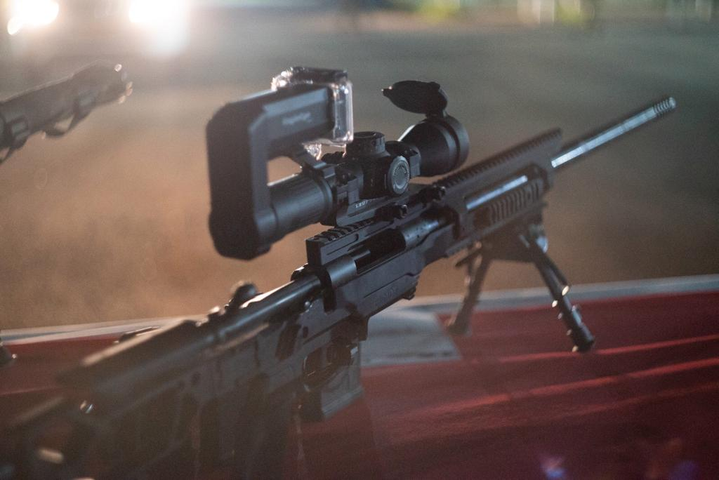 M24 עם טלסקופ יום "ירין". פיתוחי הנשק שהציגה מחלקת האמל"ח בזרוע היבשה למפקדי צה"ל הבכירים. מקלעים משוכללים וכוונות דיגיטליות, תצפית נשלטת מרחוק ומטול שיירה רקטות קטנות - אלו רק חלק קטן מפיתוחי הנשק.